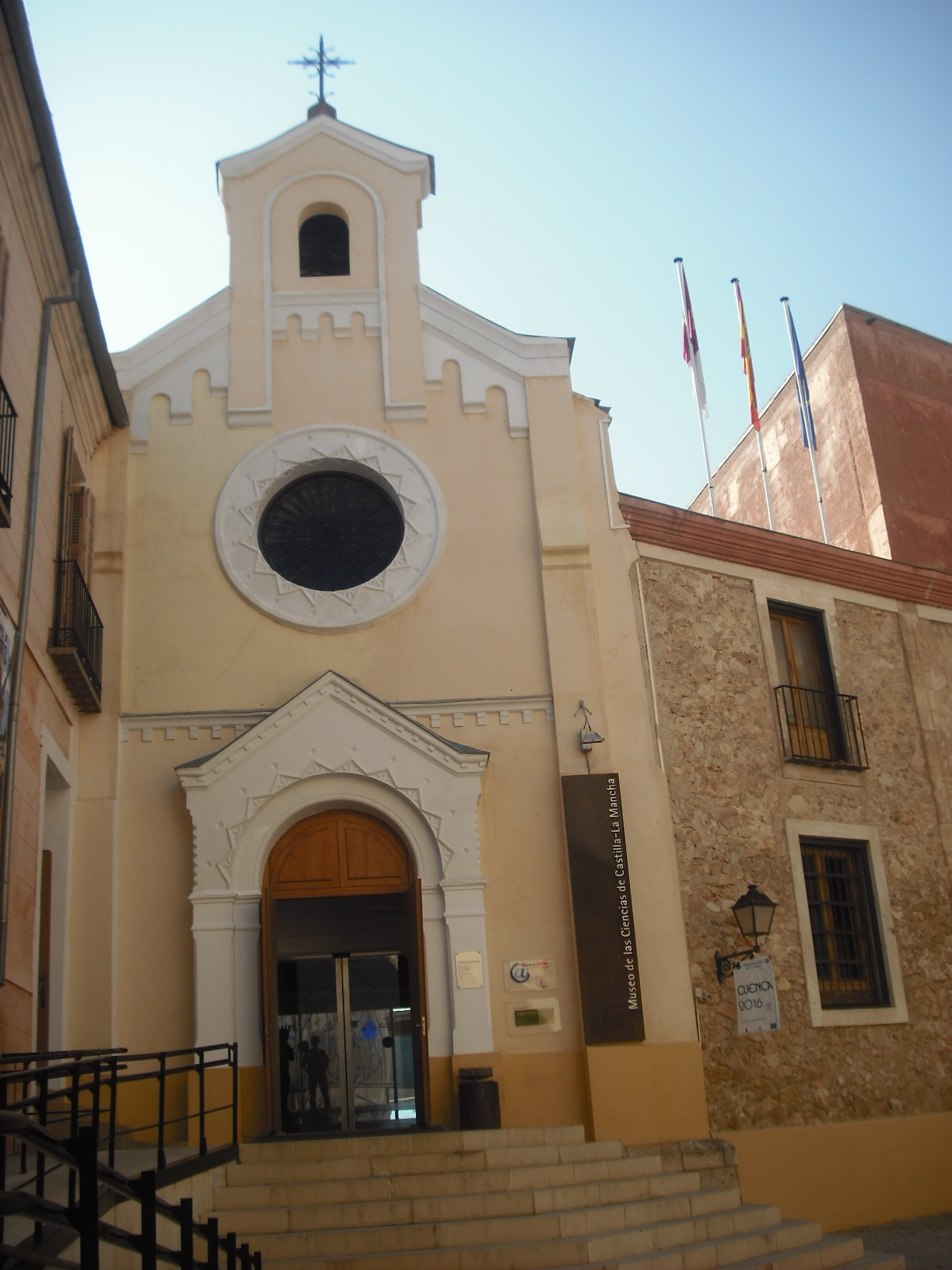 Museo de las Ciencas de Castilla-La Mancha.